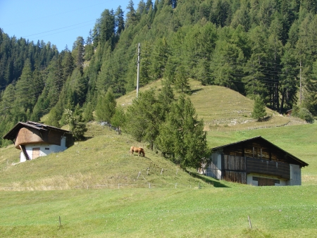 Infanteriewerk A 7838 in Sufers, Kanton Graubünden: Aussenansicht